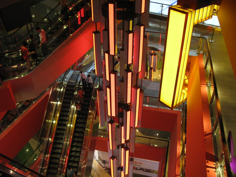 MegaBox VOID